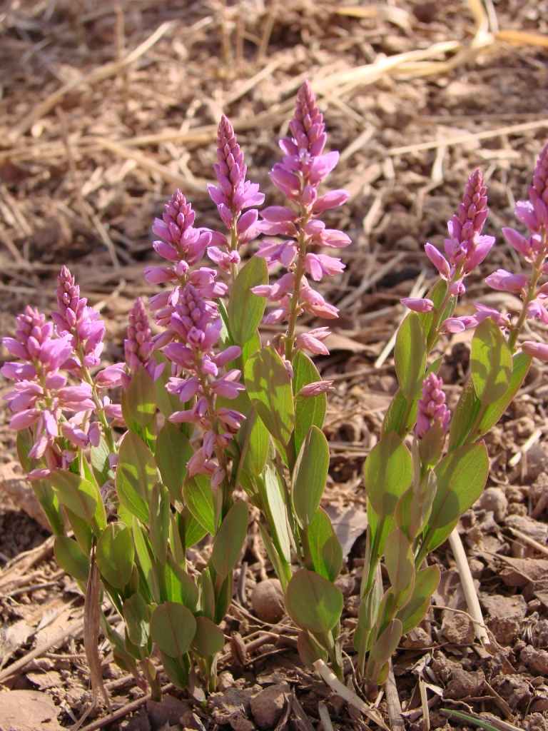 Polygala poaya Mart. - Sin. het. Polygala angulata DC. - POLYGALACEAE - APA da Bacia do Rio São Bartolomeu - Brasília - Distrito Federal - Brasil.